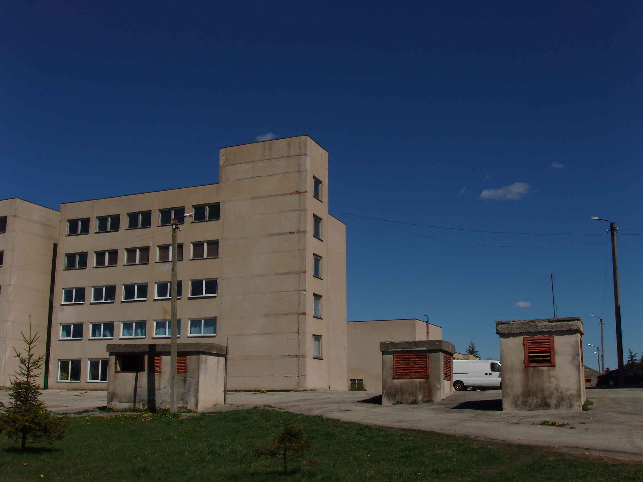 Esiplaanil on näha tohutu varjendikompleksi mõnda maapeale ulatuvat osa. Tagaplaanil asub Kose Teeninduskooli üks tiib, milles võib näha Kose Päevakeskuse (teine korrus) ja Kose Kunstikooli (kolmas korrus) aknaridasid.